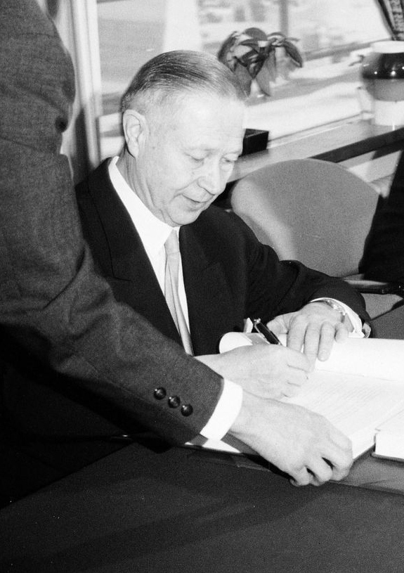 Ylijohtaja K. J. Tolonen (1899–1965) allekirjoittaa Saimaan kanavasopimusta.